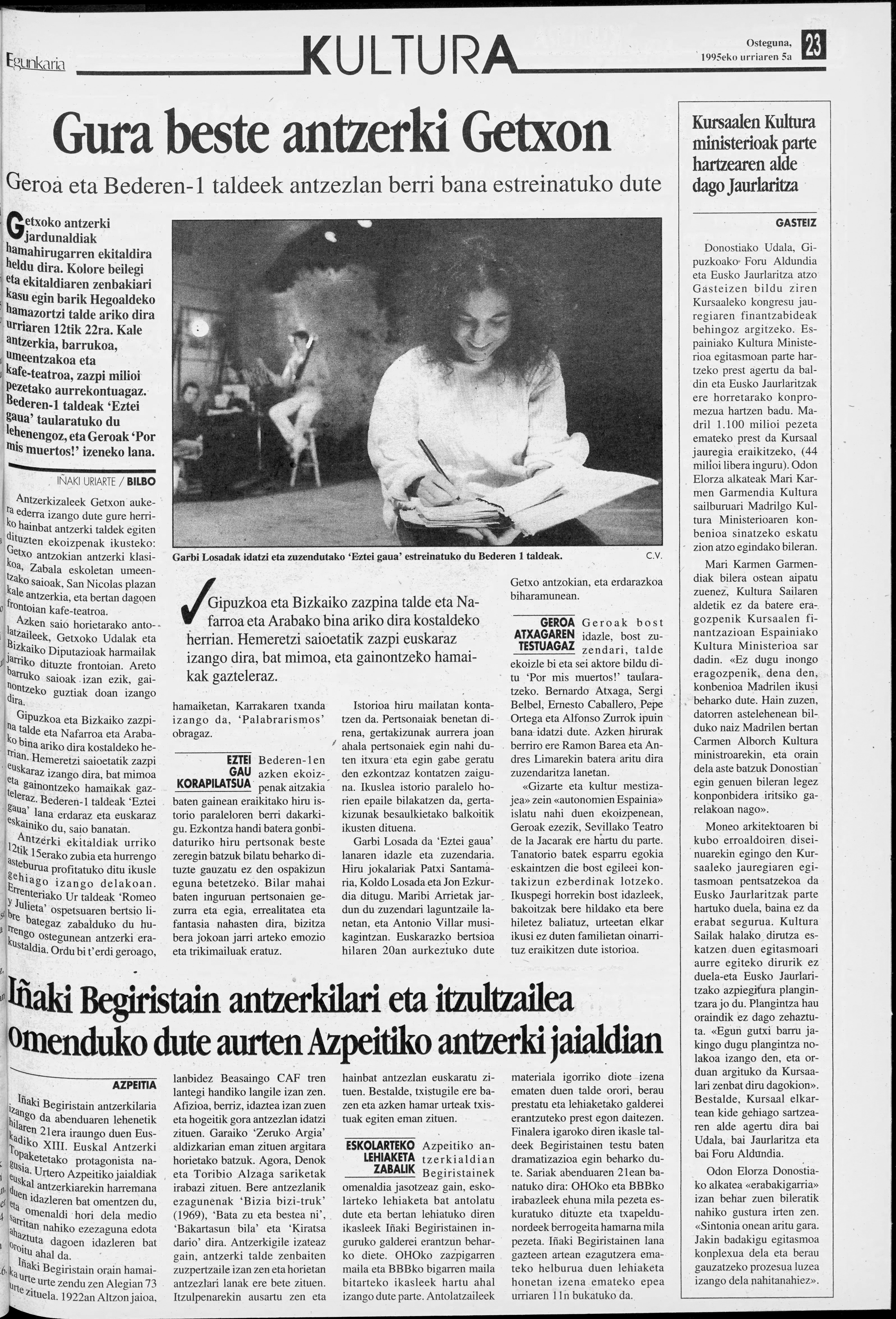 Garbi Losada Bederen-1 antzerki taldeko zuzendaria 1995ean.